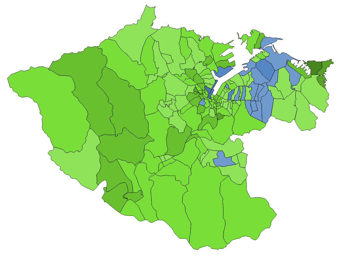 顏色對照表